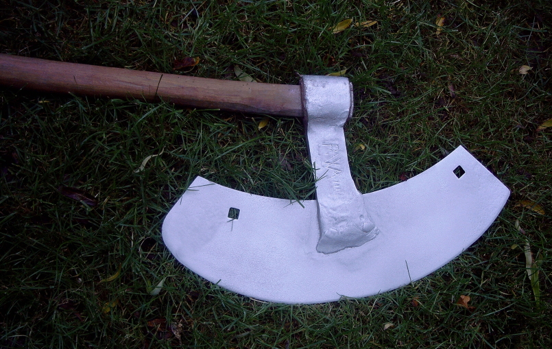 Wiesenbeil